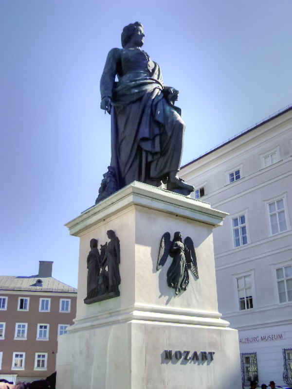 Mozartdenkmal in Salzburg